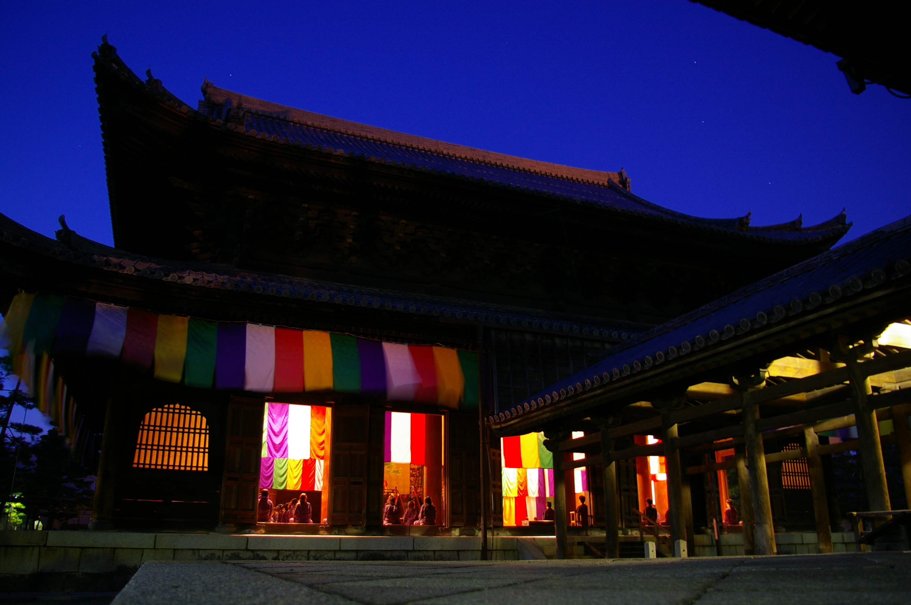 座禅の風景、妙心寺にて. 法堂、座禅が行われている. 妙心寺法堂.